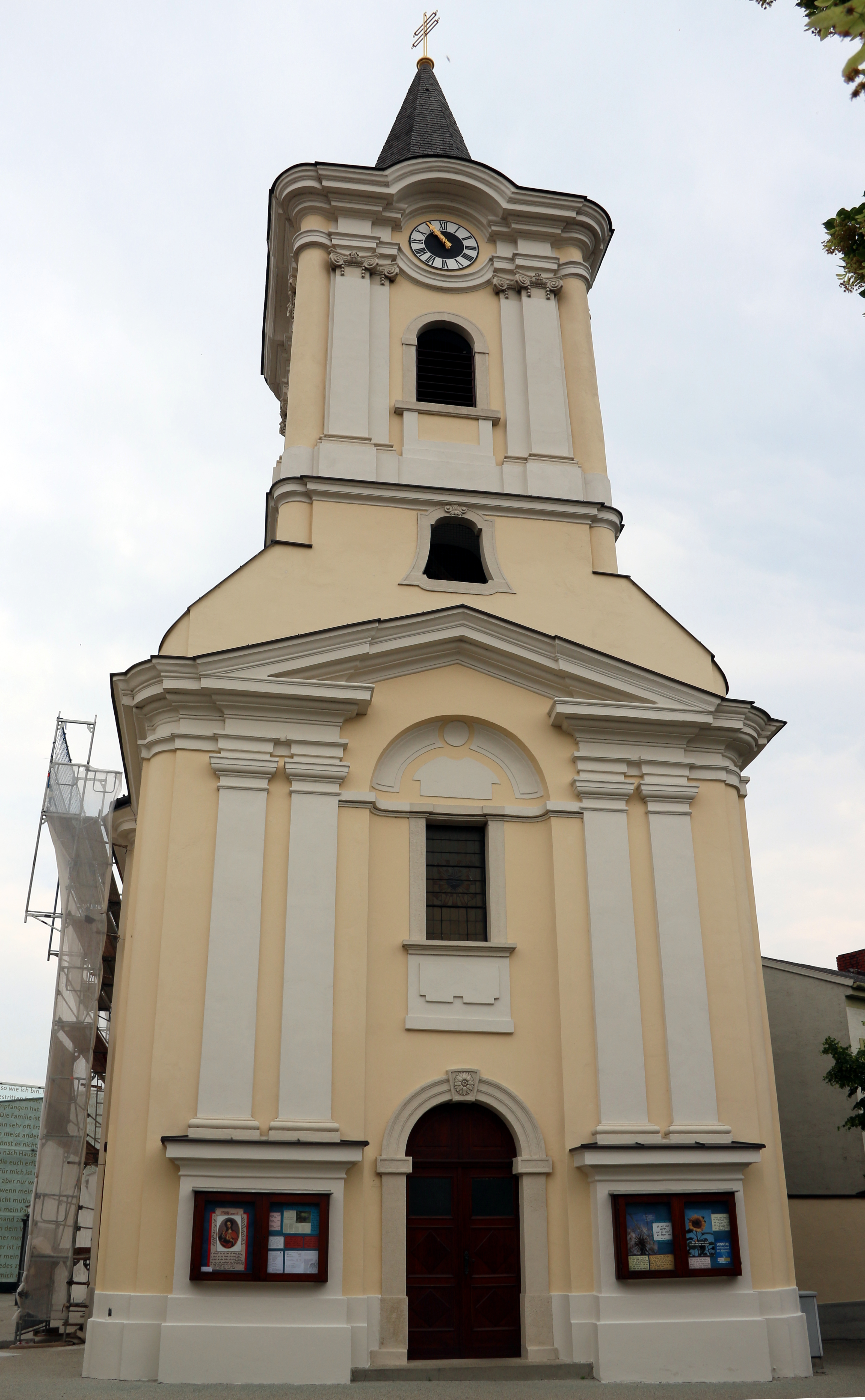 Kath. Pfarrkirche hl. Katharina in Podersdorf am See, Burgenland.